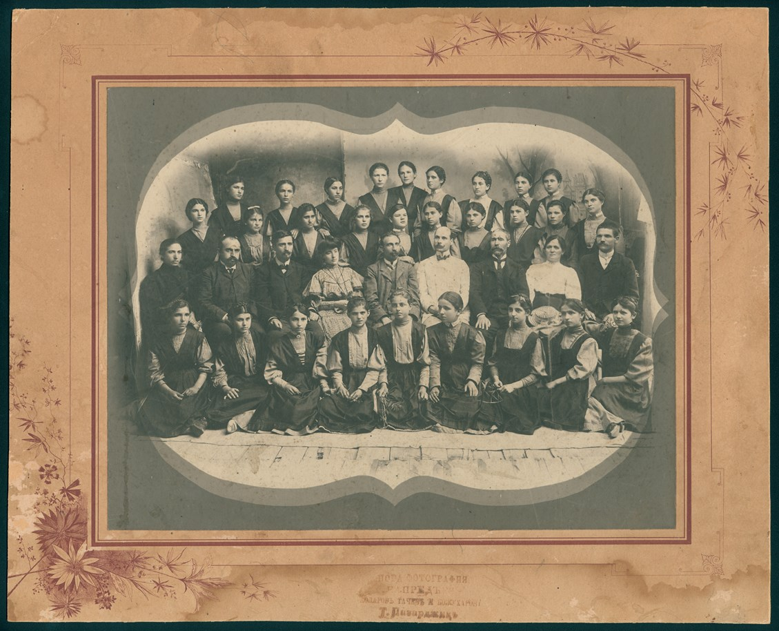 Снимка на директора на Девическата непълна гимназия - Татар Пазарджик Илион Стамболиев с колеги и ученички.